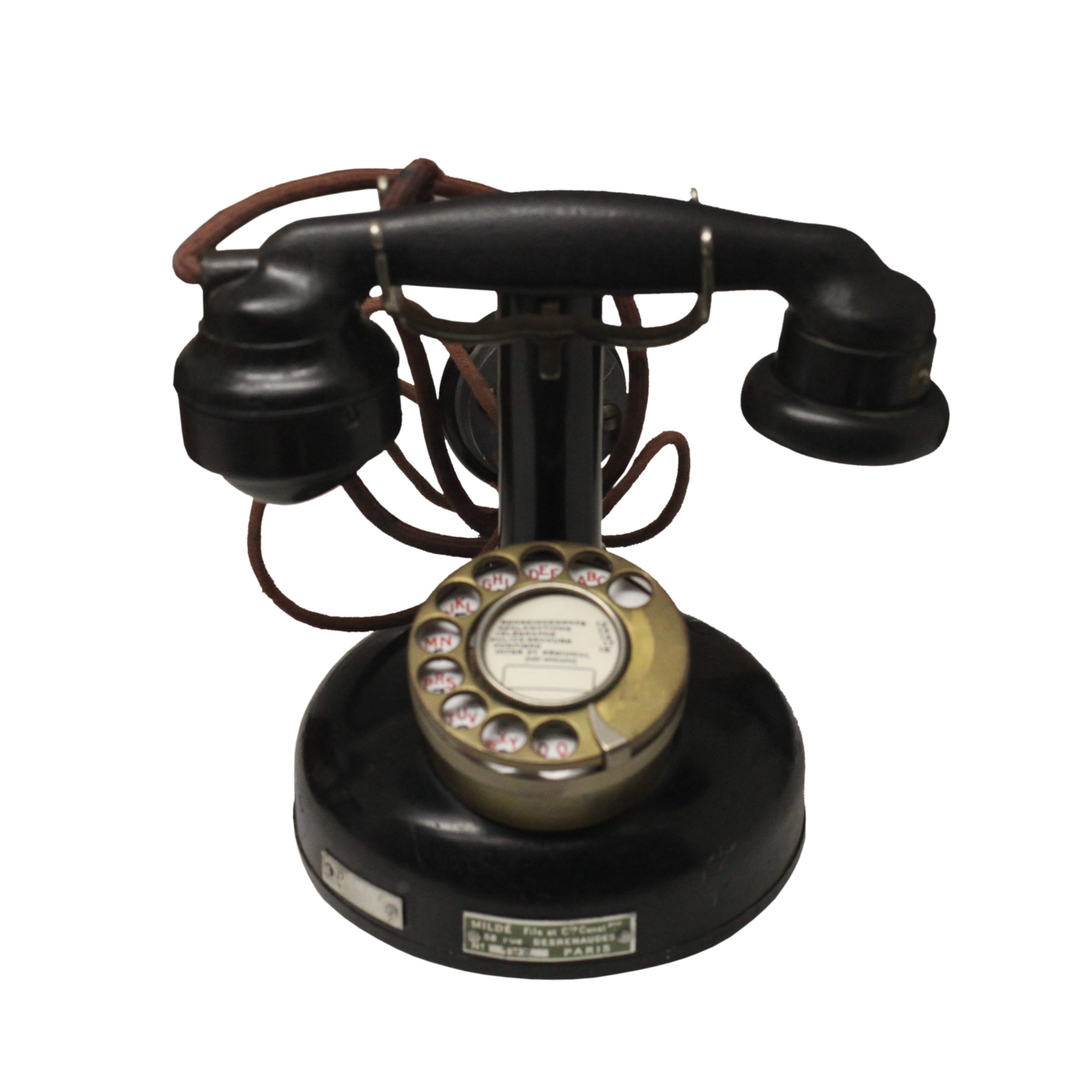 Telephone model PTT24, 1942. Administration des Postes, Télégraphes et Téléphones (PTT). Bakelite, metal. On display at Lyon.